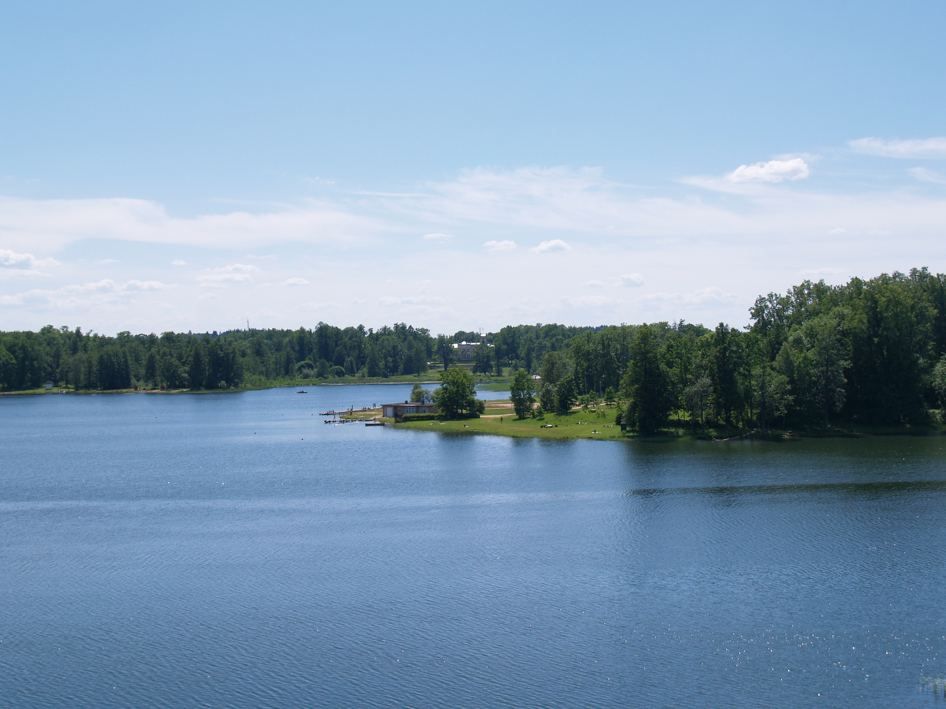 Alūksnes ezers (Lake Aluksne)